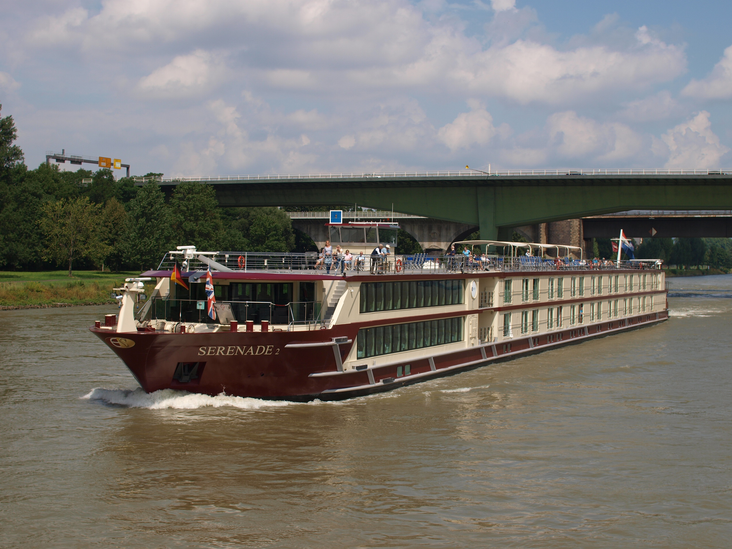 Kabinenschiff Serenade 2 auf dem Mittelrhein